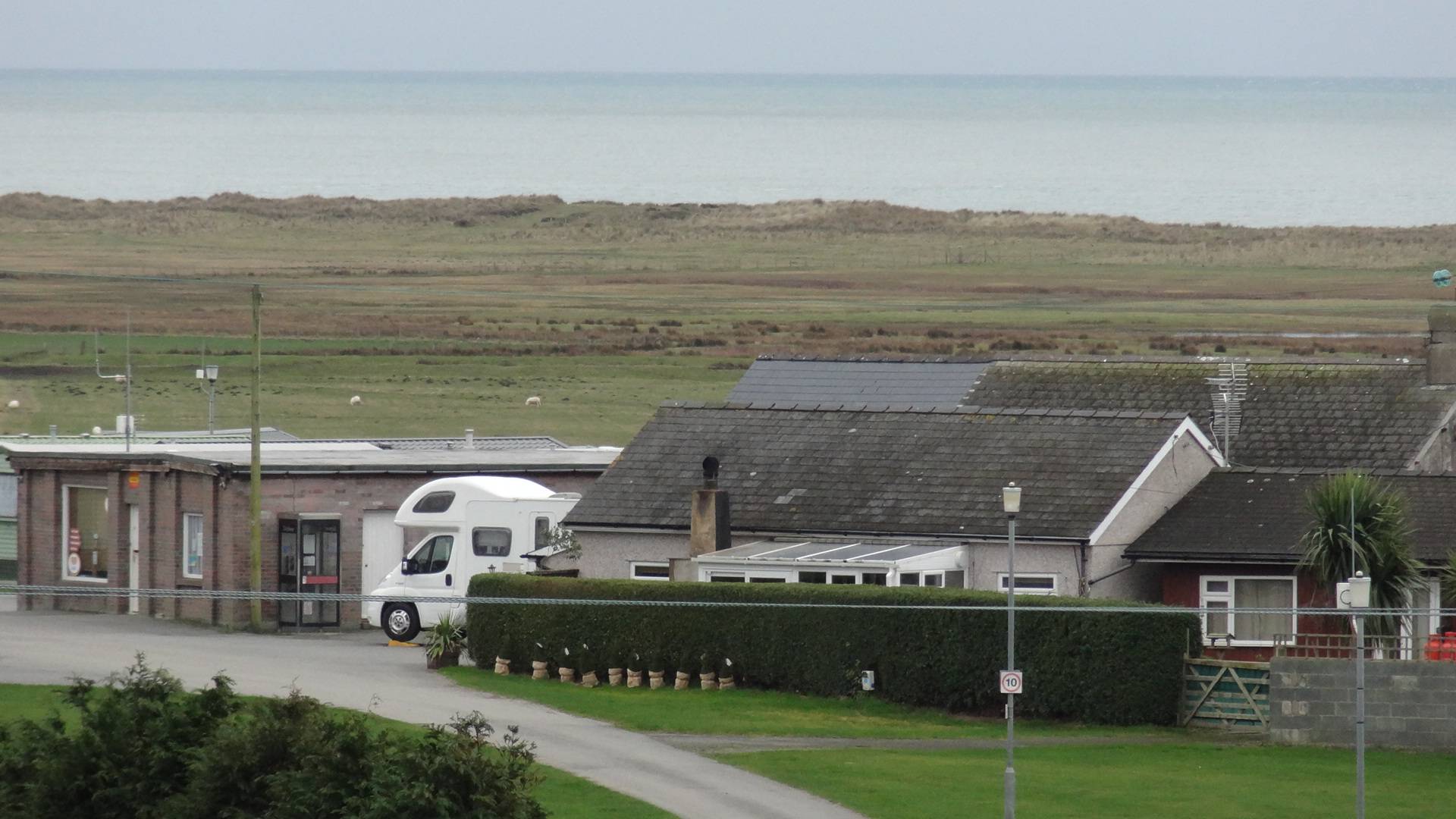 Morfa i'r dde o Dywyn